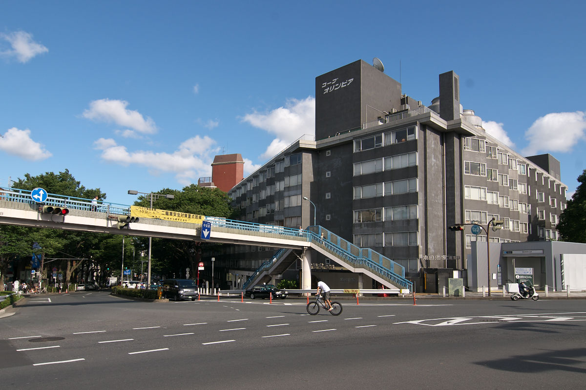 原宿表参道と「コープオリンピア」。1963年完成の初期の分譲集合住宅。